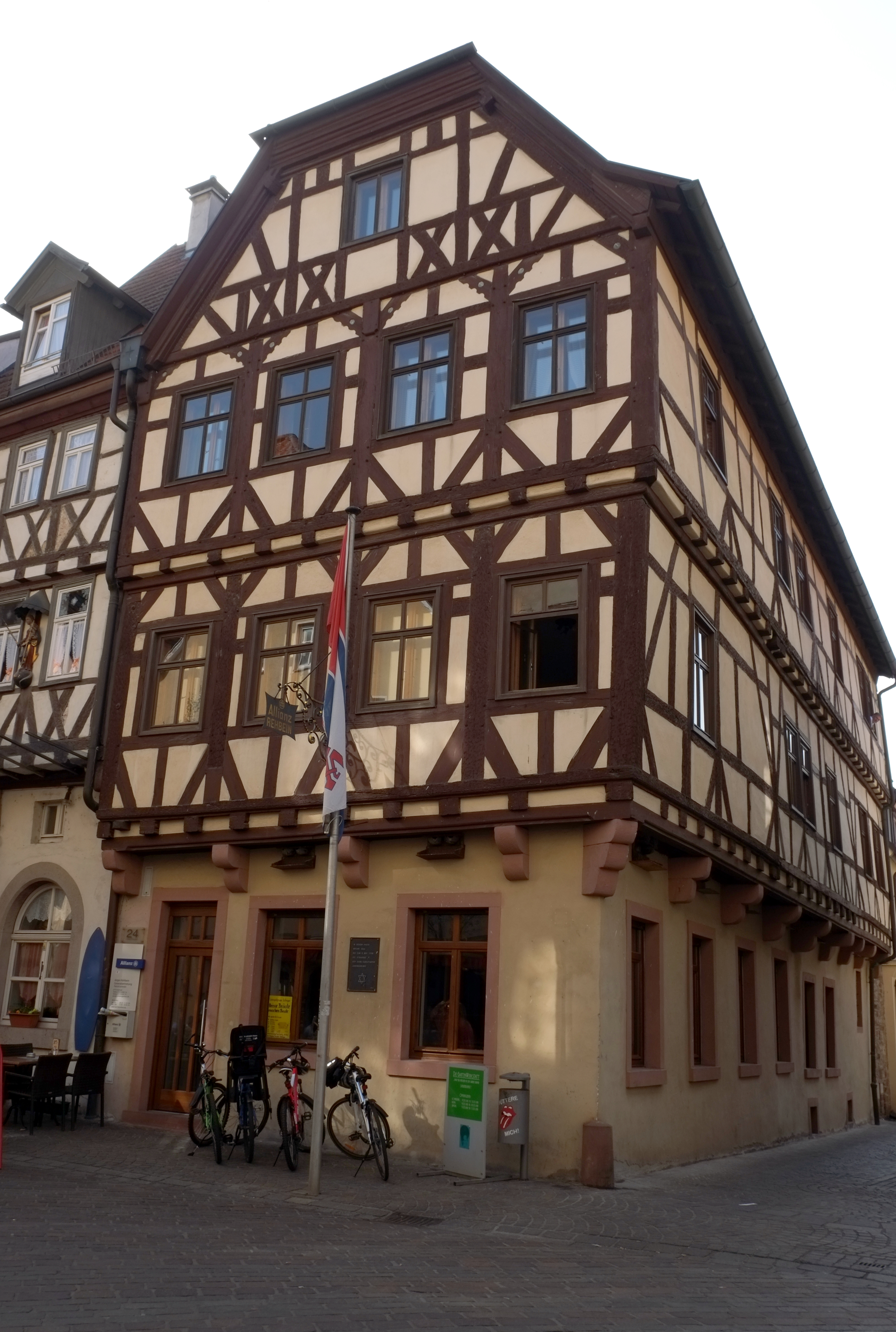 Haus Hauptstraße 24 in Karlstadt im Main-Spessart-Kreis (Bayern, Deutschland)